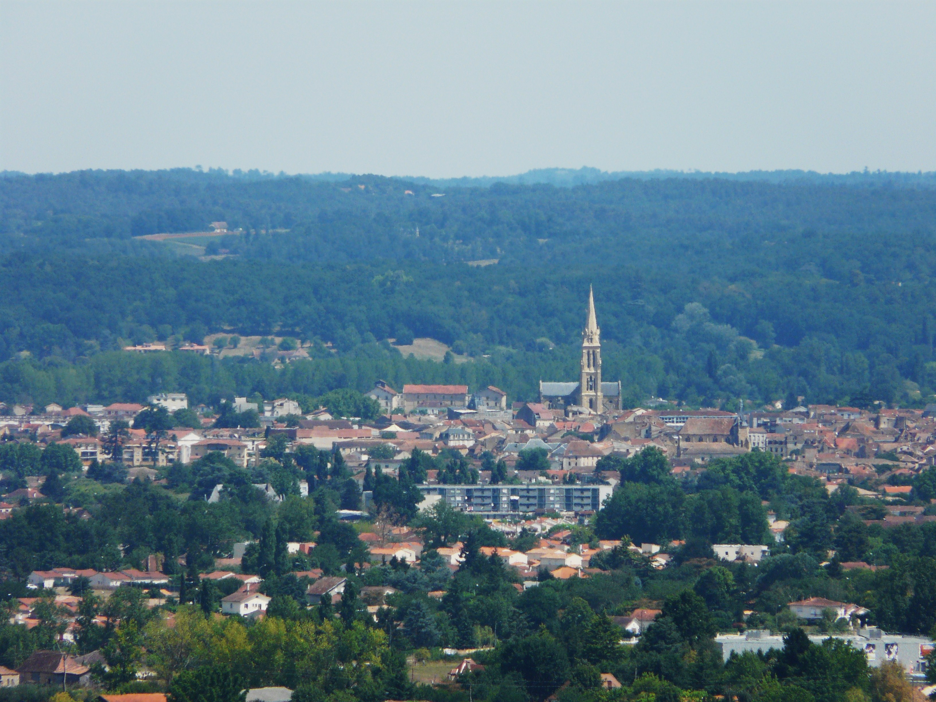 La ville de Bergerac vue depuis la route départementale 17, Dordogne, France.